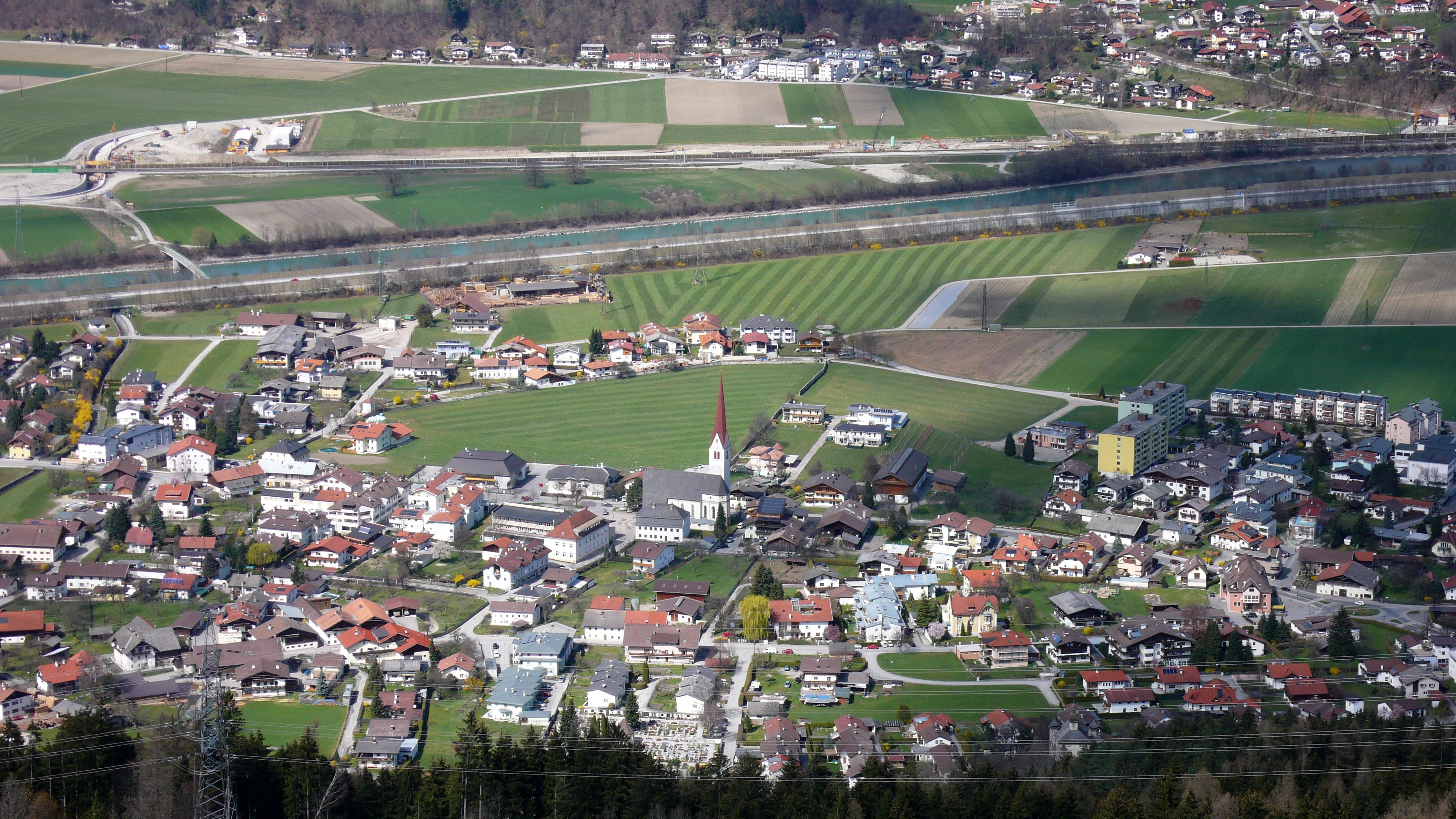 Volders Tirol Austria